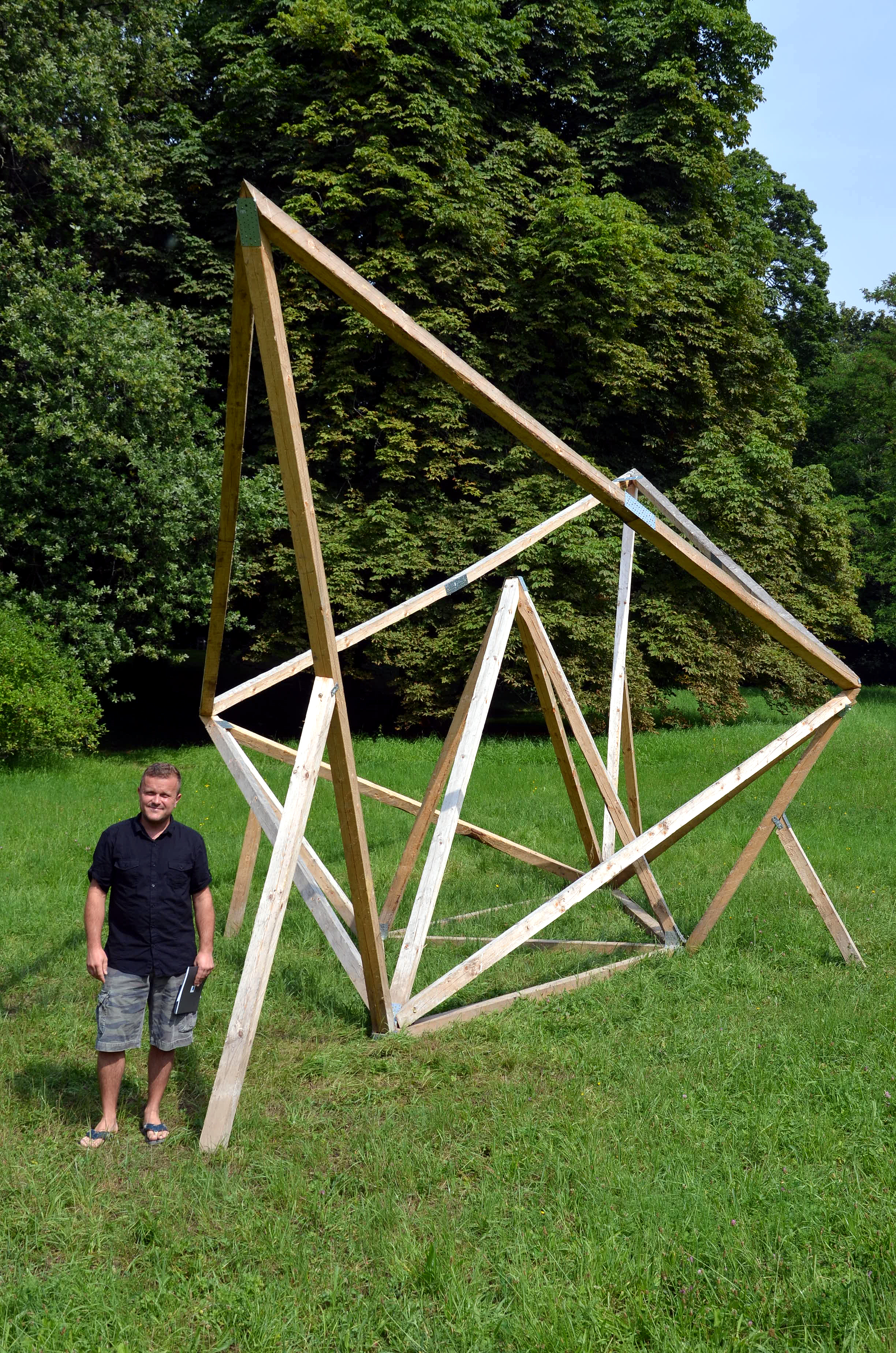 Während der Pressekonferenz zu der im August 2013 in Hannover präsentierten Ausstellung WasserKunst: Zwischen Deich und Teich posierte der Künstler Edin Bajrić auf Wunsch der Fotografen neben seiner Installation „Arche“ in der historischen Parkanlage vom Edelhof Ricklingen ...